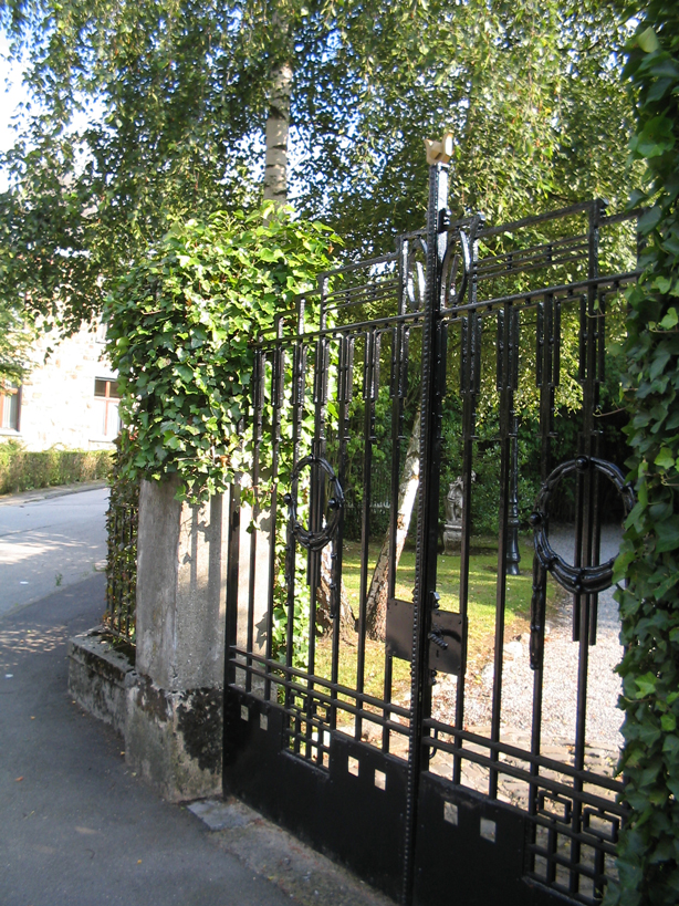 Grille en fer forgé réalisée avant 1950 par Henri Metzmacher (1873-1951). A l'entrée d'une villa située avenue Mon Bijou à Malmedy (Belgique). D'après un membre de la Commission des Monuments et Sites, elle traduirait l'influence de Gustave Serrurier (motifs carrés dans le bas de la grille) et de l'école de Weimar (motifs floraux dans la partie médiane).